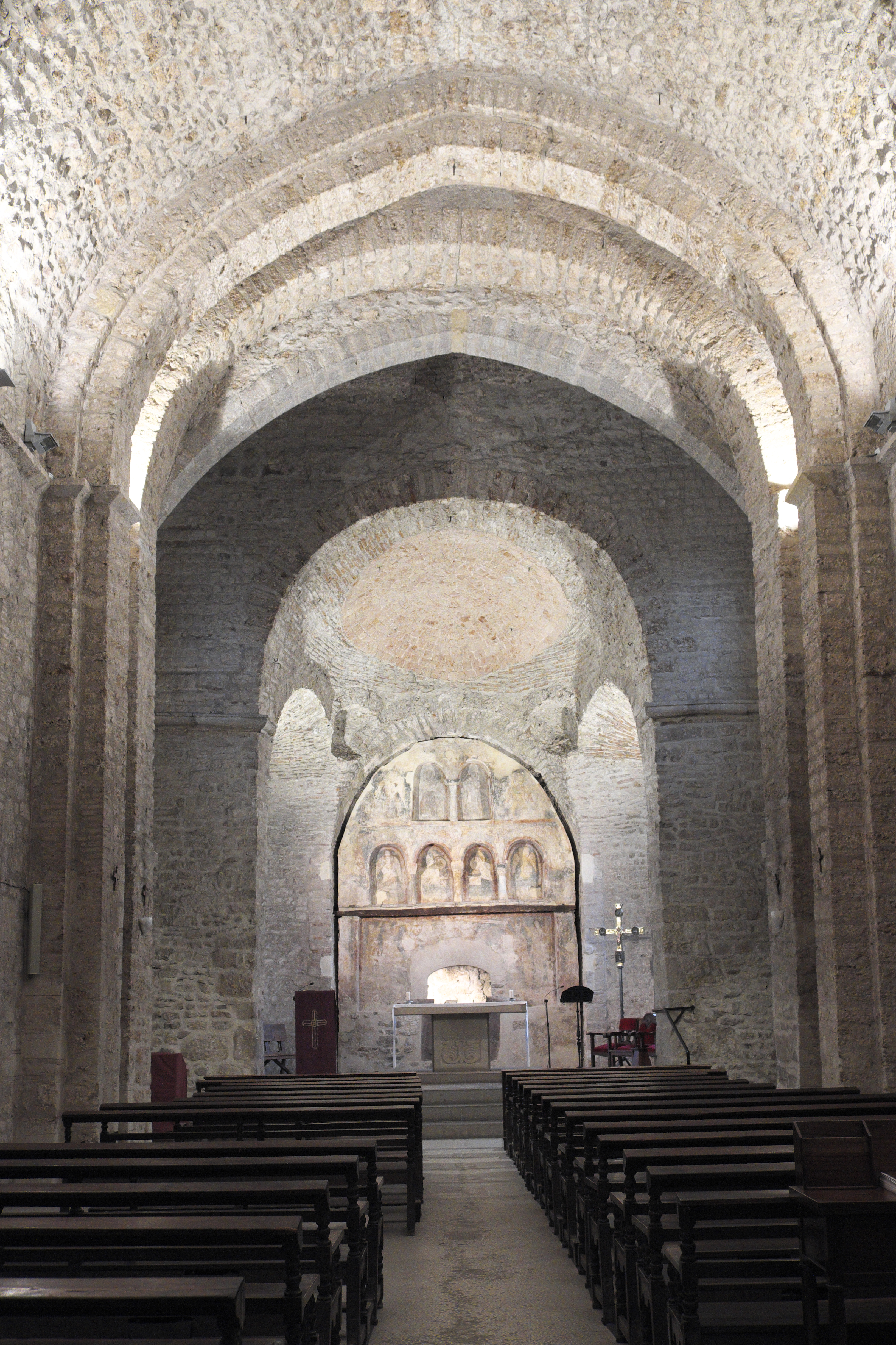 Kirche Sant Pere (Conjunto monumental de Egara) in Terrassa in der Provinz Barcelona (Katalonien/Spanien), Innenraum